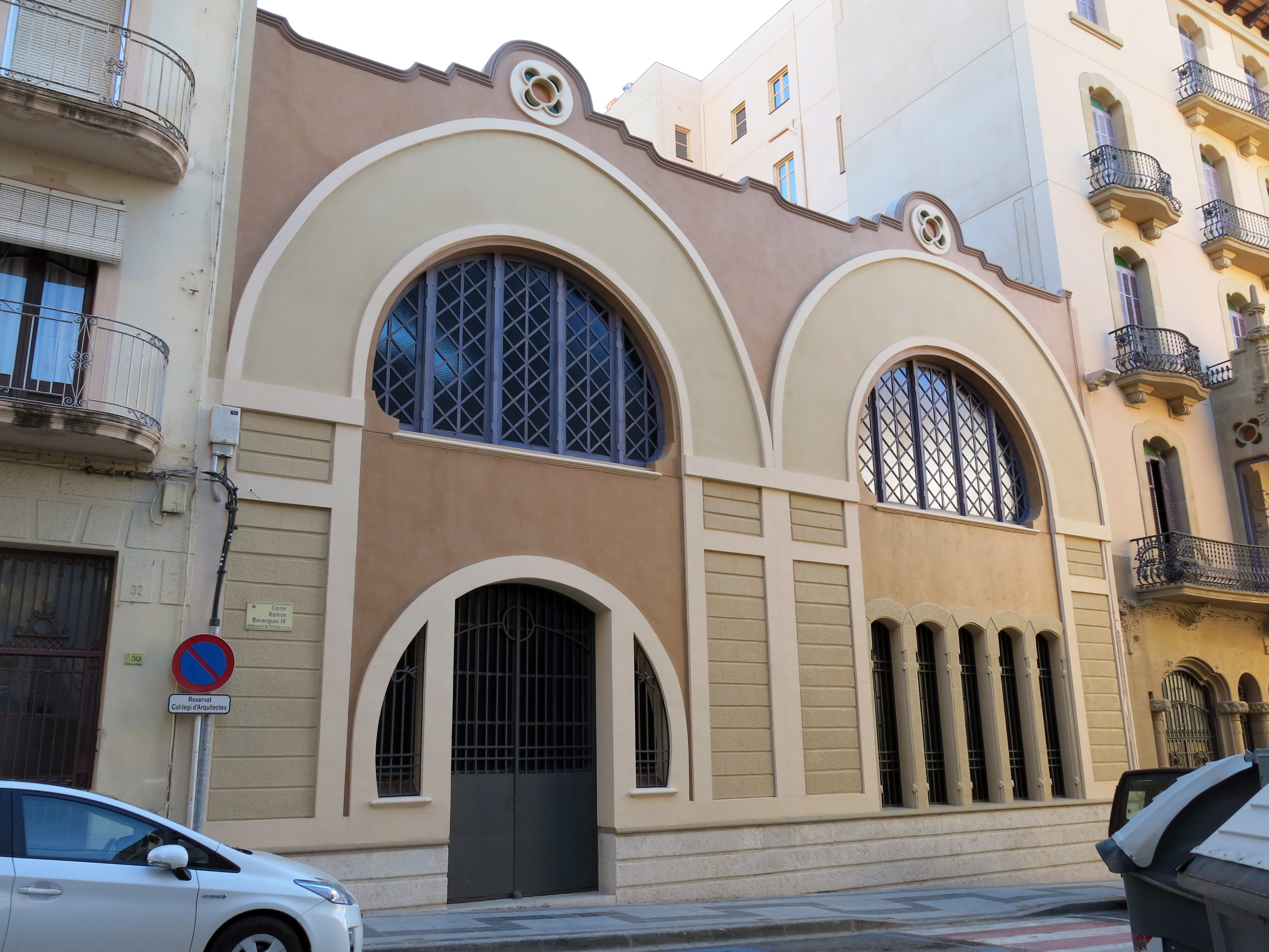 Casa Bau (Tortosa)